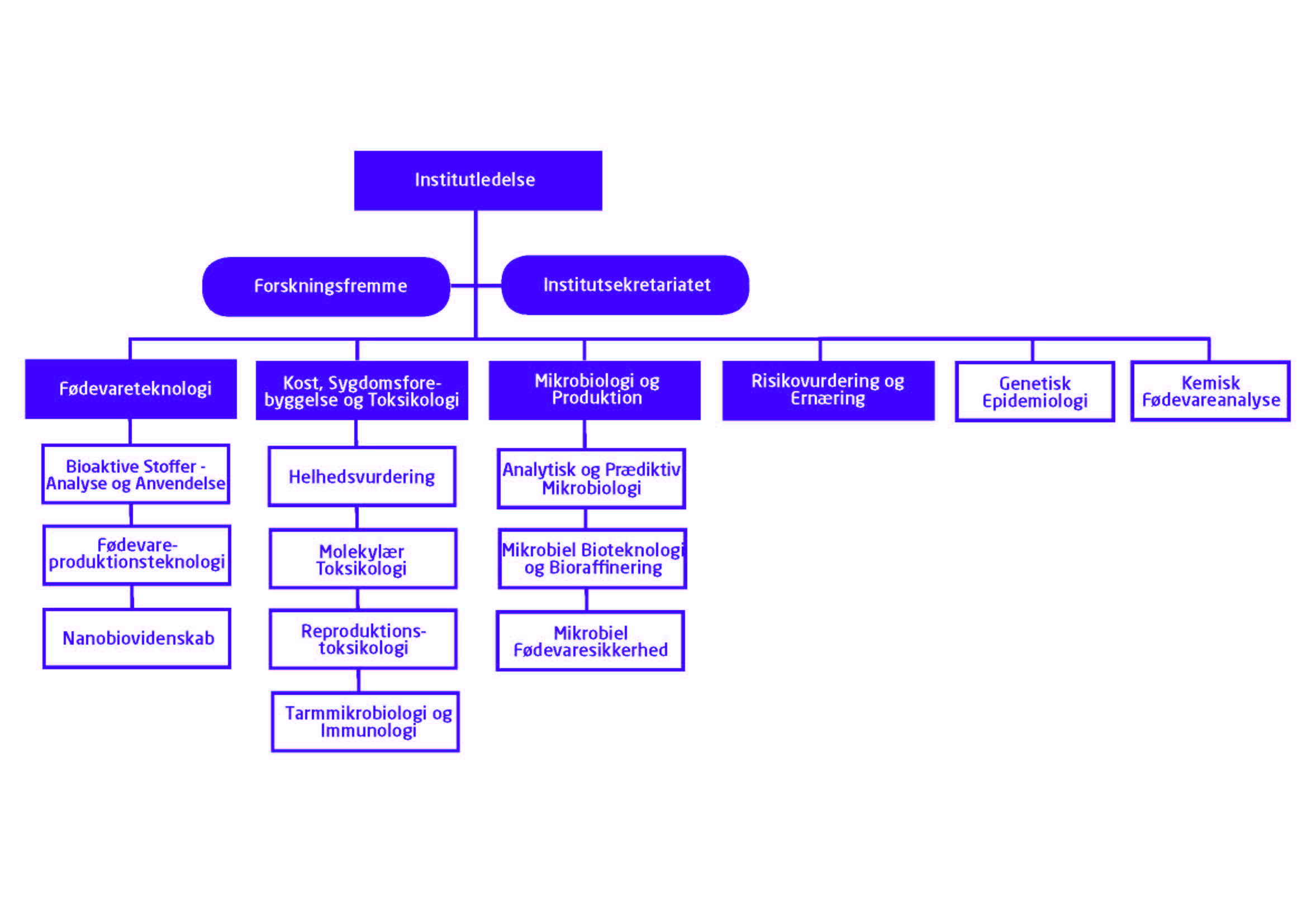 DTU Fødevareinstituttets organisationsdiagram